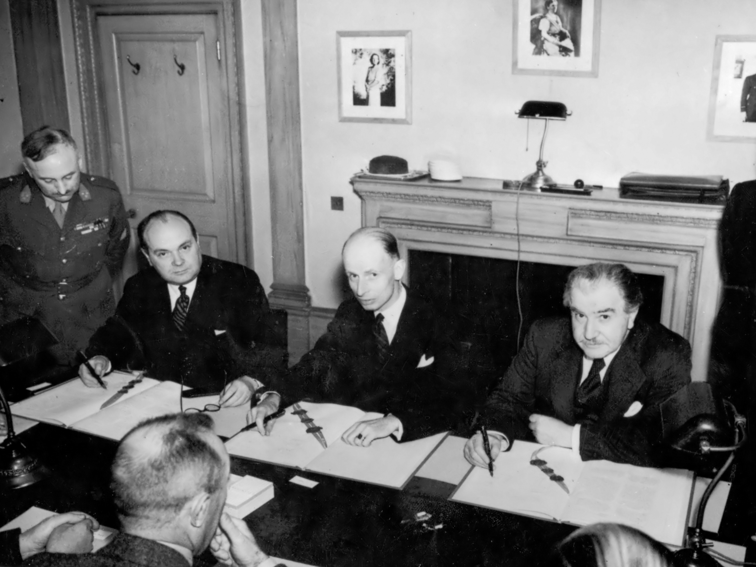 Benelux 21 oktober 1943